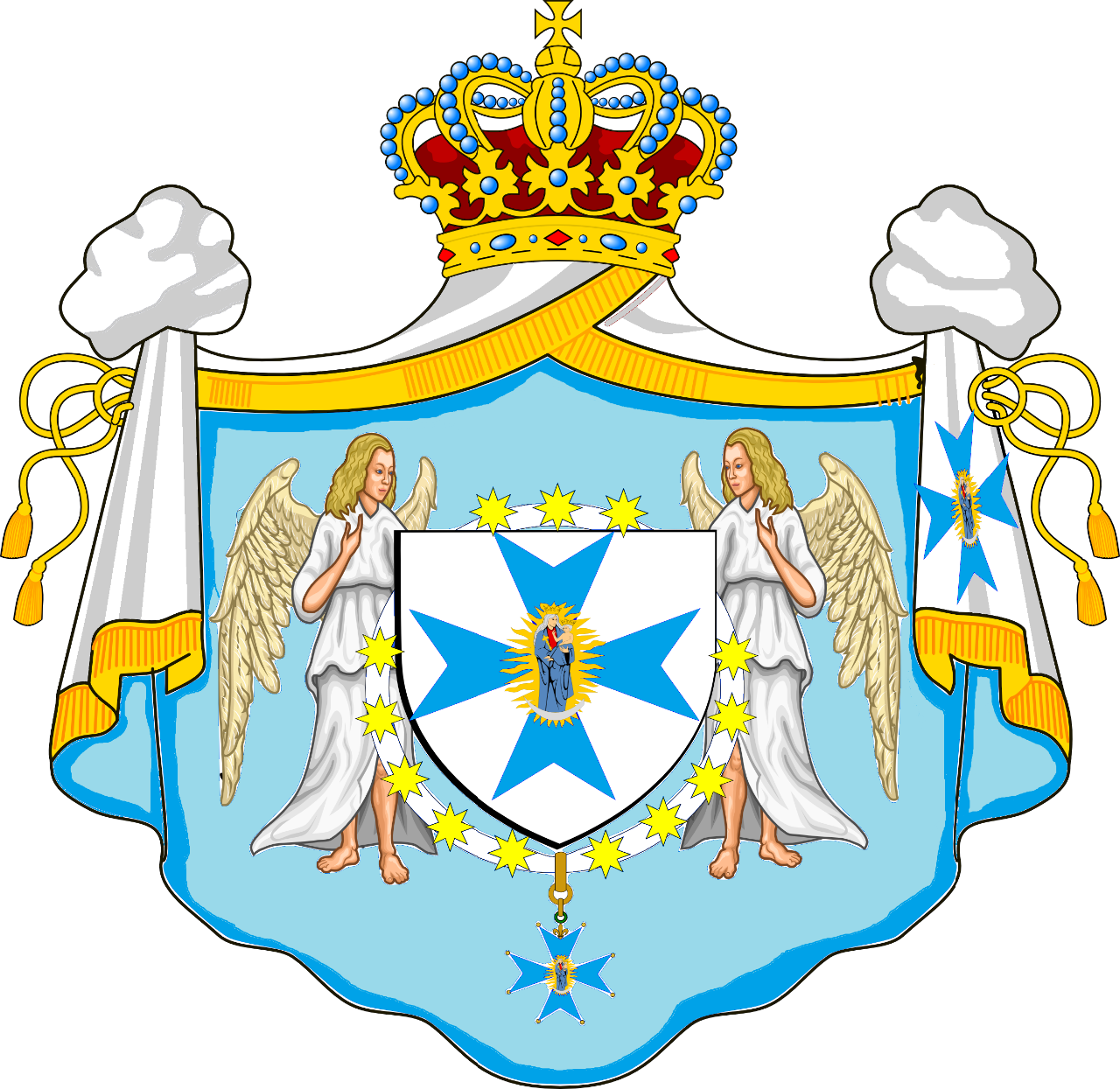 Erb Řádu